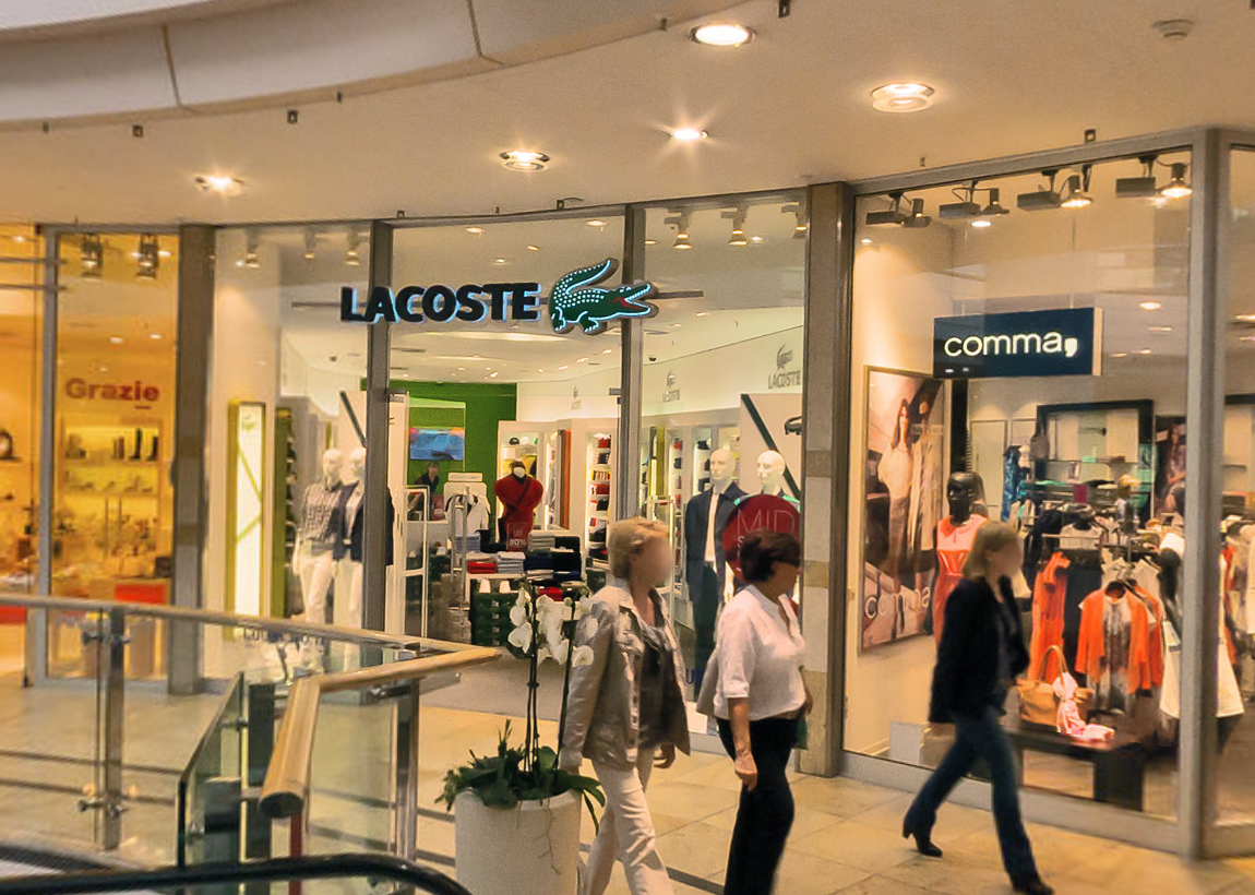 Boutique / Store in Dresden, Altmarkt-Galerie, Mai 2014